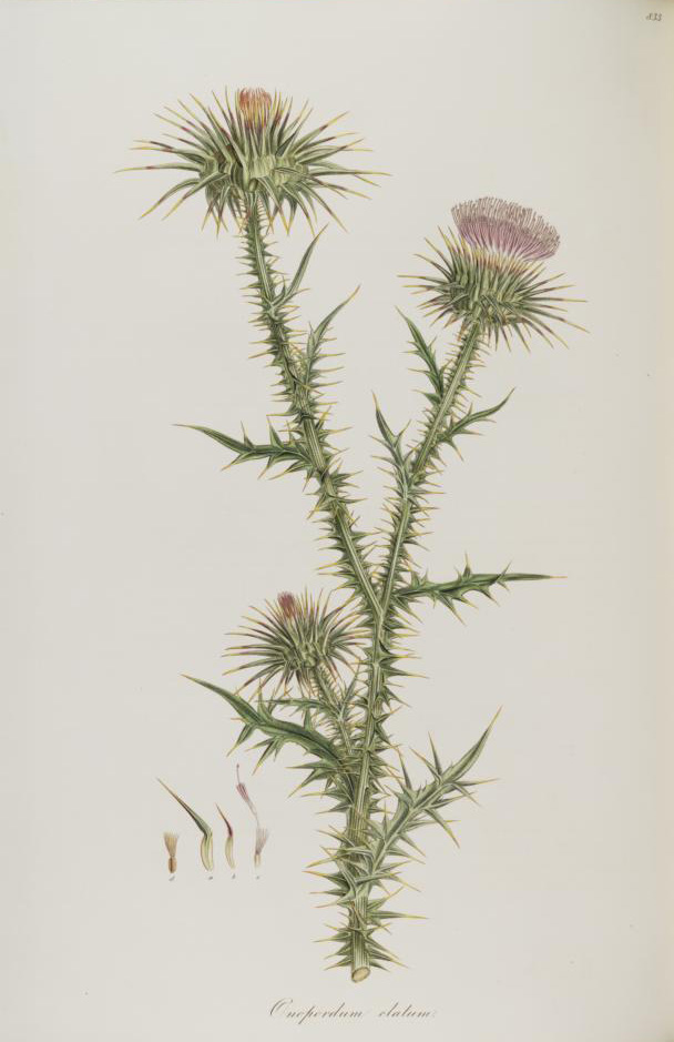 Onopordum tauricum Legende: a) Äußeres Hüllblatt (x1); b) Inneres Hüllblatt (x1); c) Röhrenblüte (x1); d) Frucht (x1).